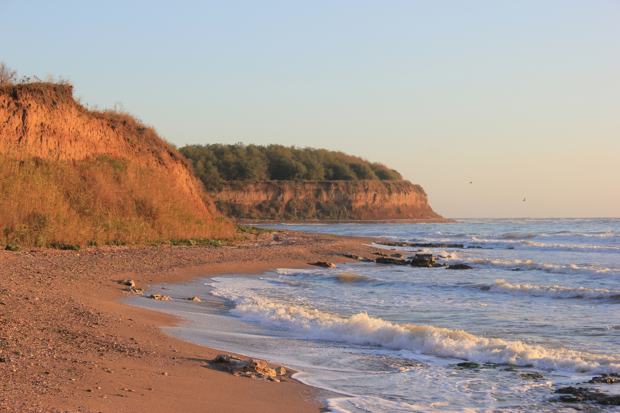 Am Schwarzen Meer zwischen Durankulak und Vama Veche an der bulgarisch-rumänischen Grenze.